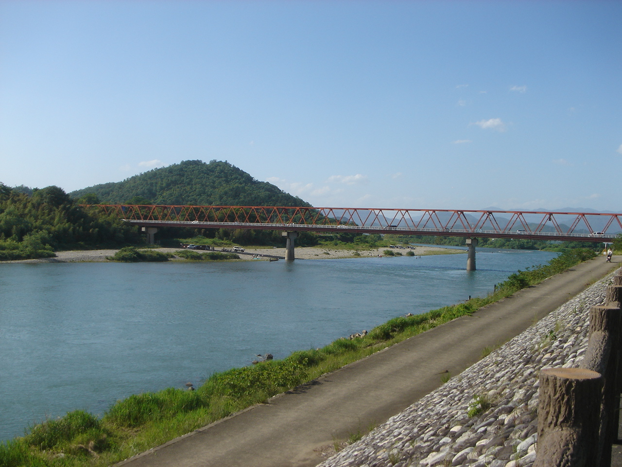 Aikawa Bashi(藍川橋),Gifu,Gifu,Japan(岐阜県岐阜市)で(下流)より撮影。川は長良川。